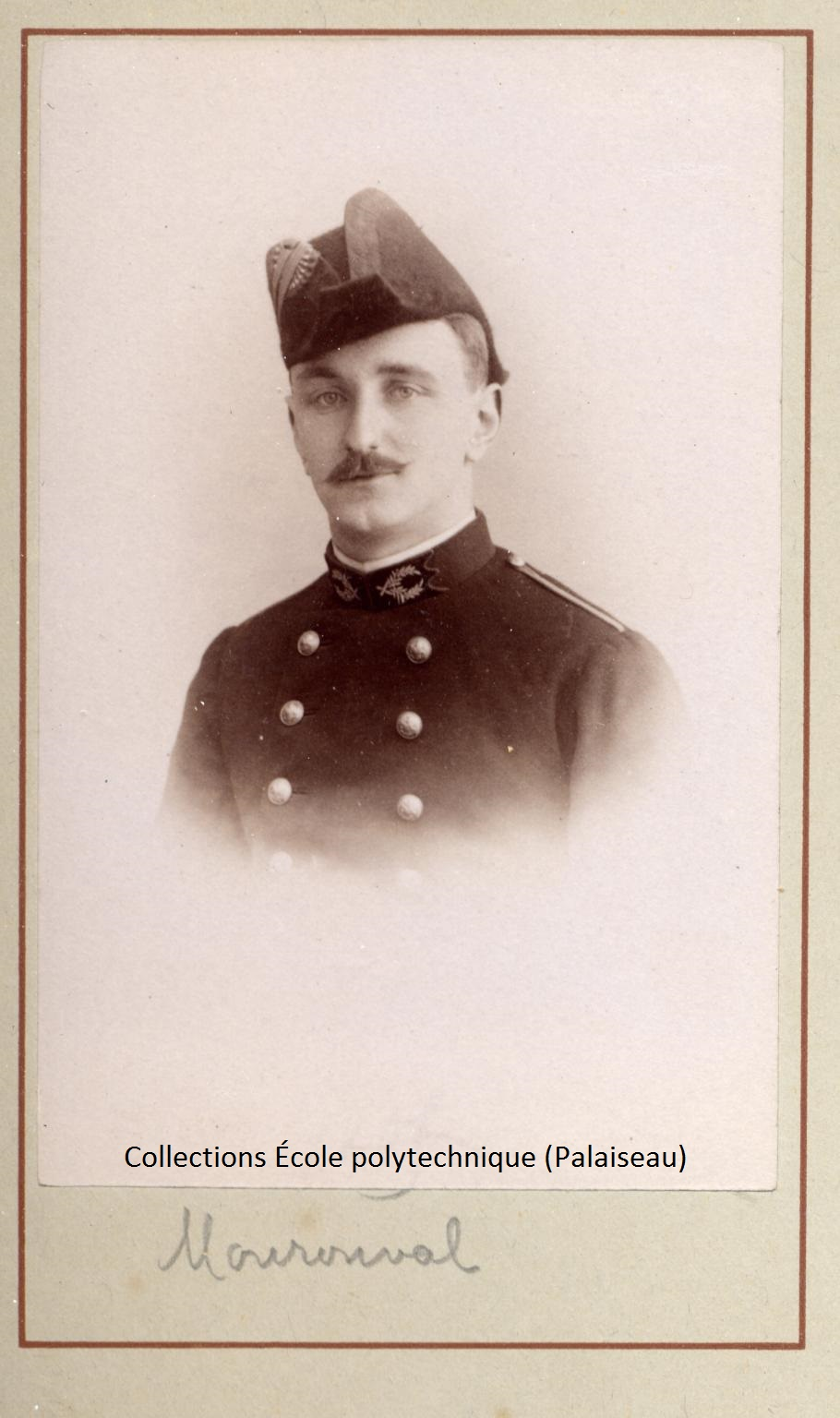 portrait de Francis Mouronval, extrait de l'album photographique de la 108e promotion de l'École polytechnique (promotion 1901) / "Ecole polytechnique 108ème promotion 1901-1903" / Paris : Pierre Petit photographe, 1901